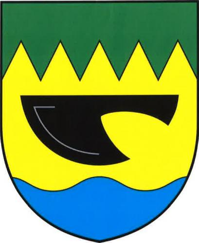 Znak, Soběšice, okres Klatovy. "Ve zlatém štítě se zelenou pilovitou hlavou a modrou vlnitou patou doleva položená a dolů obrácená černá radlice."